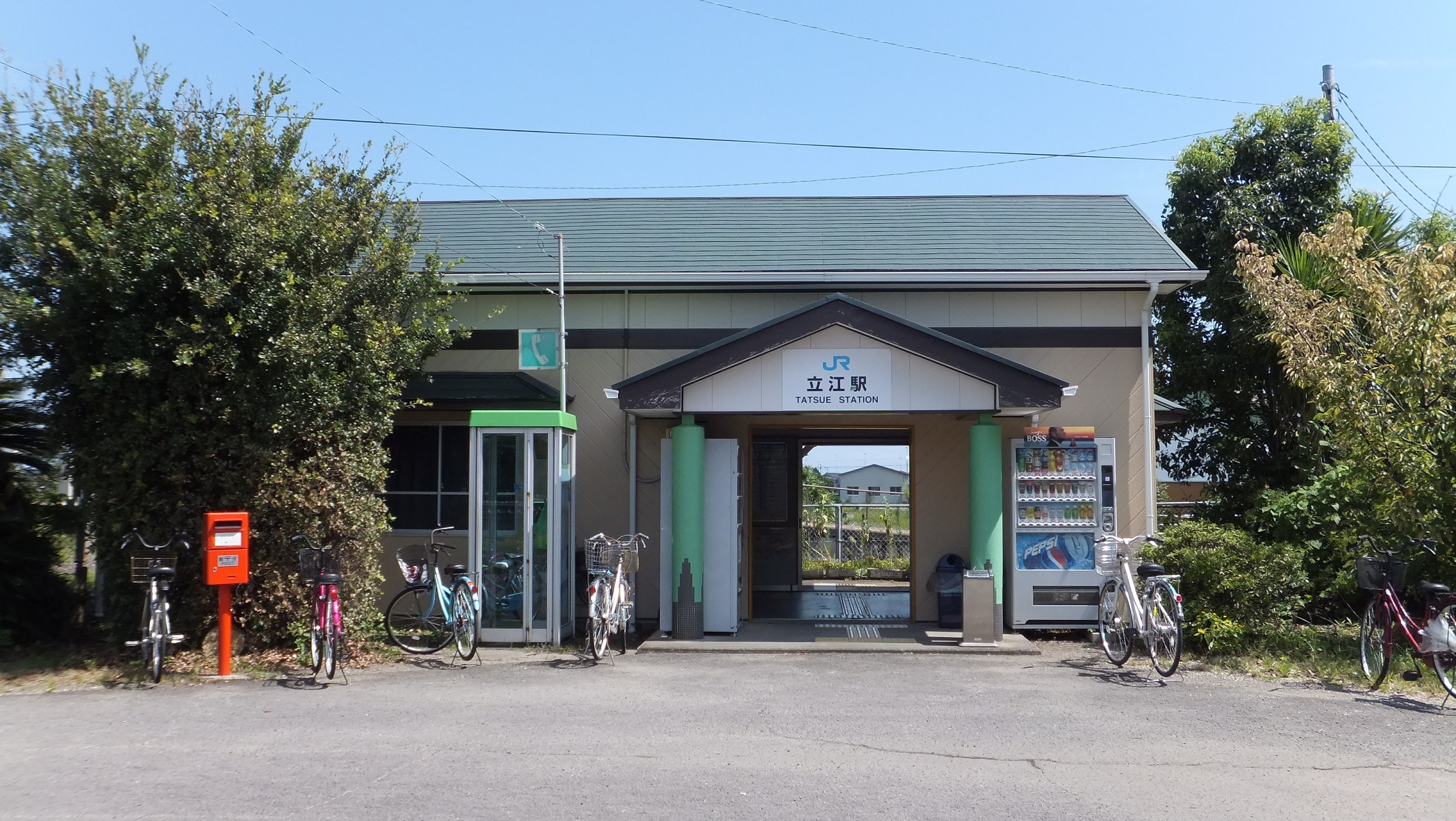 JR牟岐線 立江駅（徳島県小松島市 2015年9月）